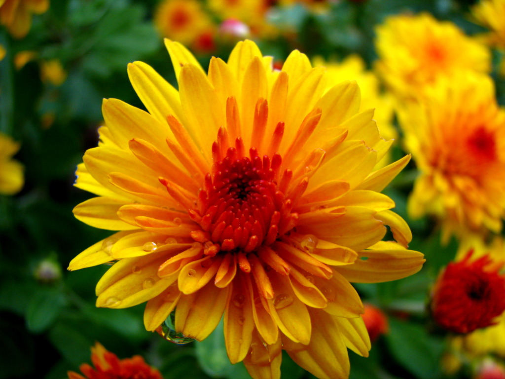 Mums And Drops